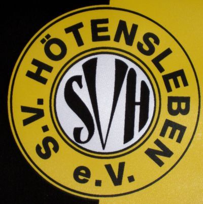 Logo SV Hötensleben